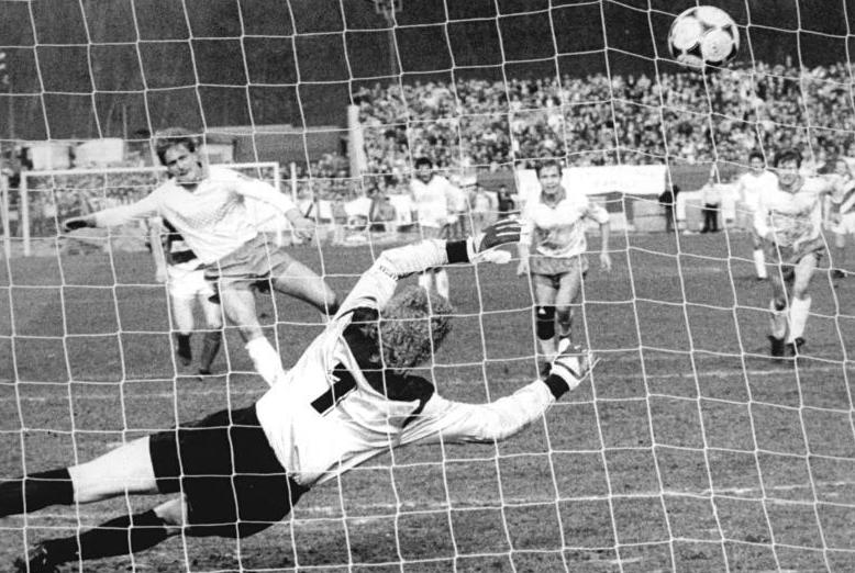 ADN-ZB-Thieme -11.3.89-B- Karl-Marx-Stadt: FDGB-Pokal-Halbfinalspiel Wismut Aue - FC Karl-Marx-Stadt 1:2 (0:0) - Das war der entscheidende zweite Treffer für die Karl-Marx-Städter durch Steffen Heidrich. Torwart Jörg Weißflog hatte gegen diesen Elfmeter keine Chance.